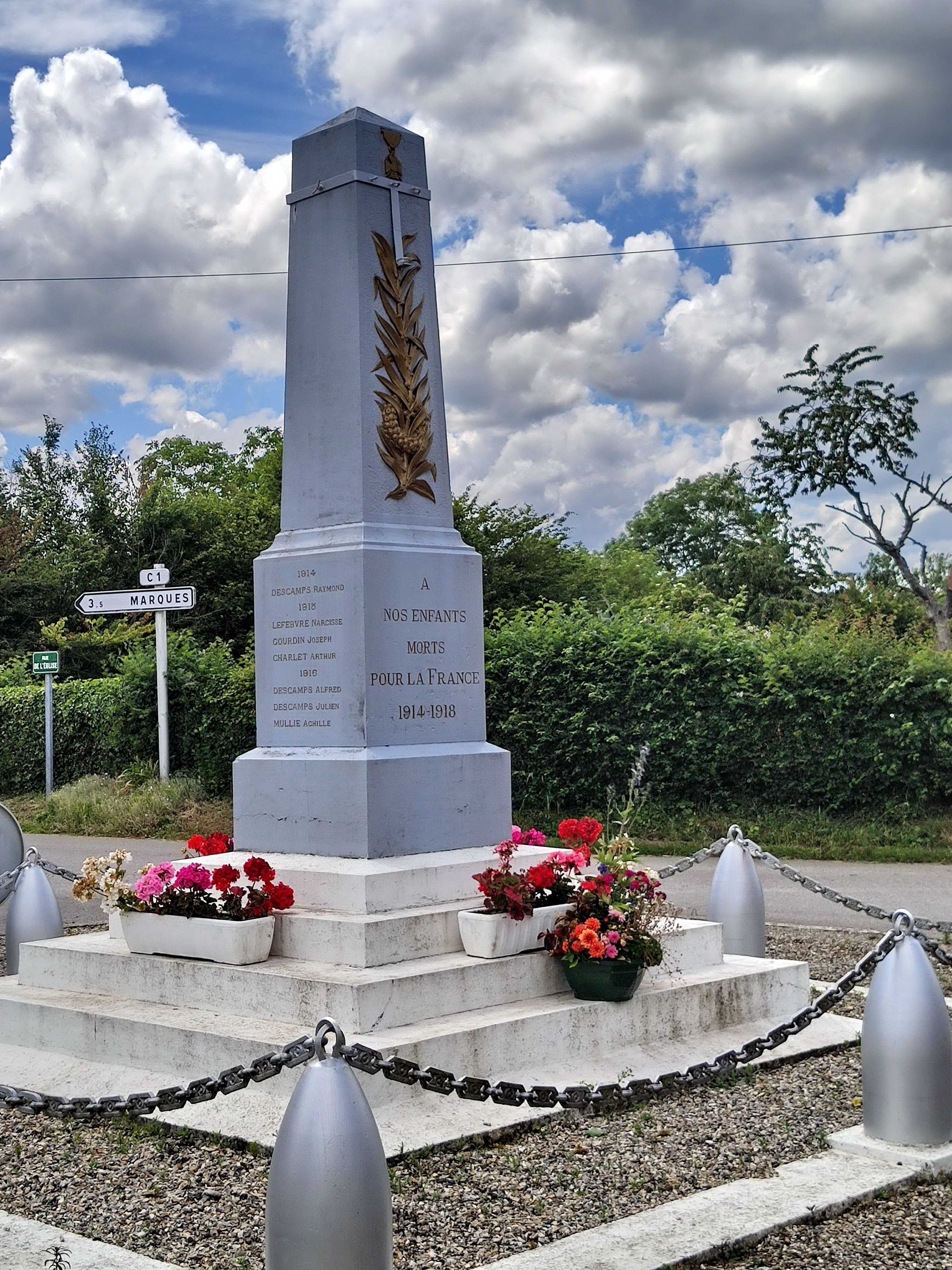 Aubéguimont - Le monument aux morts (début de la liste des Morts pour la France de la Première Guerre mondiale)